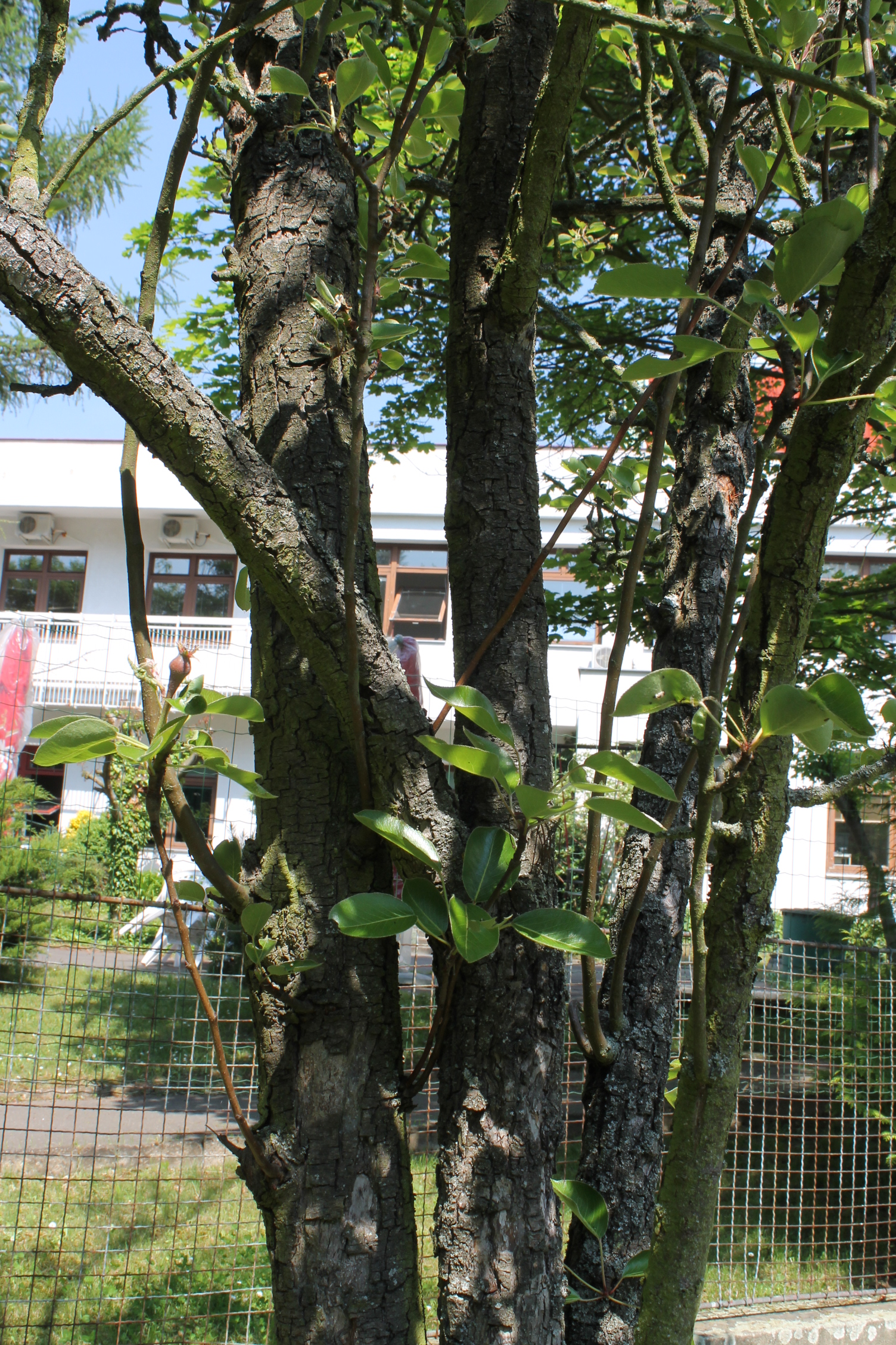 Hrušeň, letorosty na větvi, Brno Komín